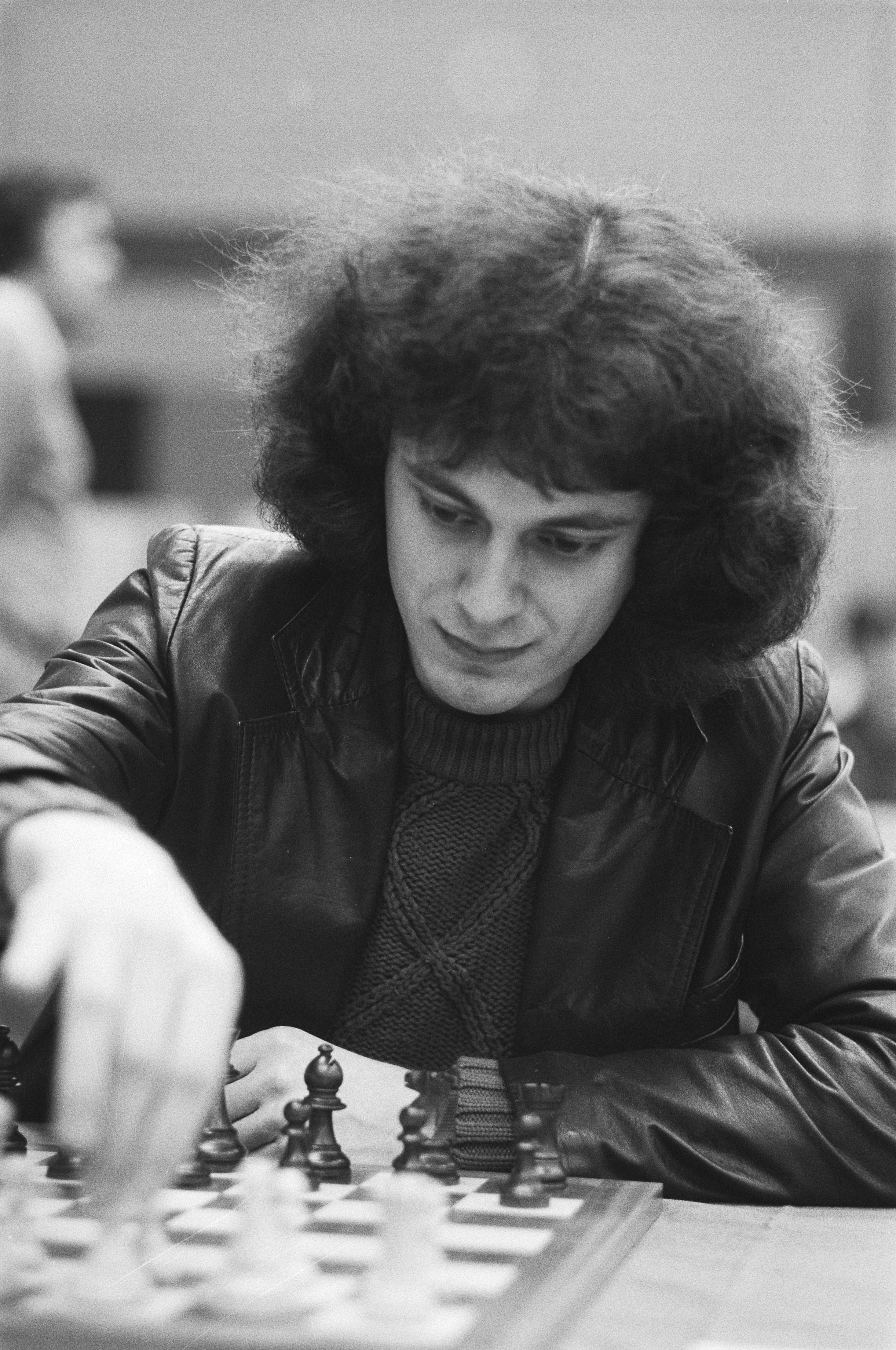 Collectie / Archief : Fotocollectie Anefo Reportage / Serie : [ onbekend ] Beschrijving : Hoogovens Schaaktoernooi vierde ronde. Nunn (koploper) in aktie Datum : 19 januari 1982 Trefwoorden : schaken, toernooien Fotograaf : Croes, Rob C. / Anefo Auteursrechthebbende : Nationaal Archief Materiaalsoort : Negatief (zwart/wit) Nummer archiefinventaris : bekijk toegang 2.24.01.05 Bestanddeelnummer : 931-9184